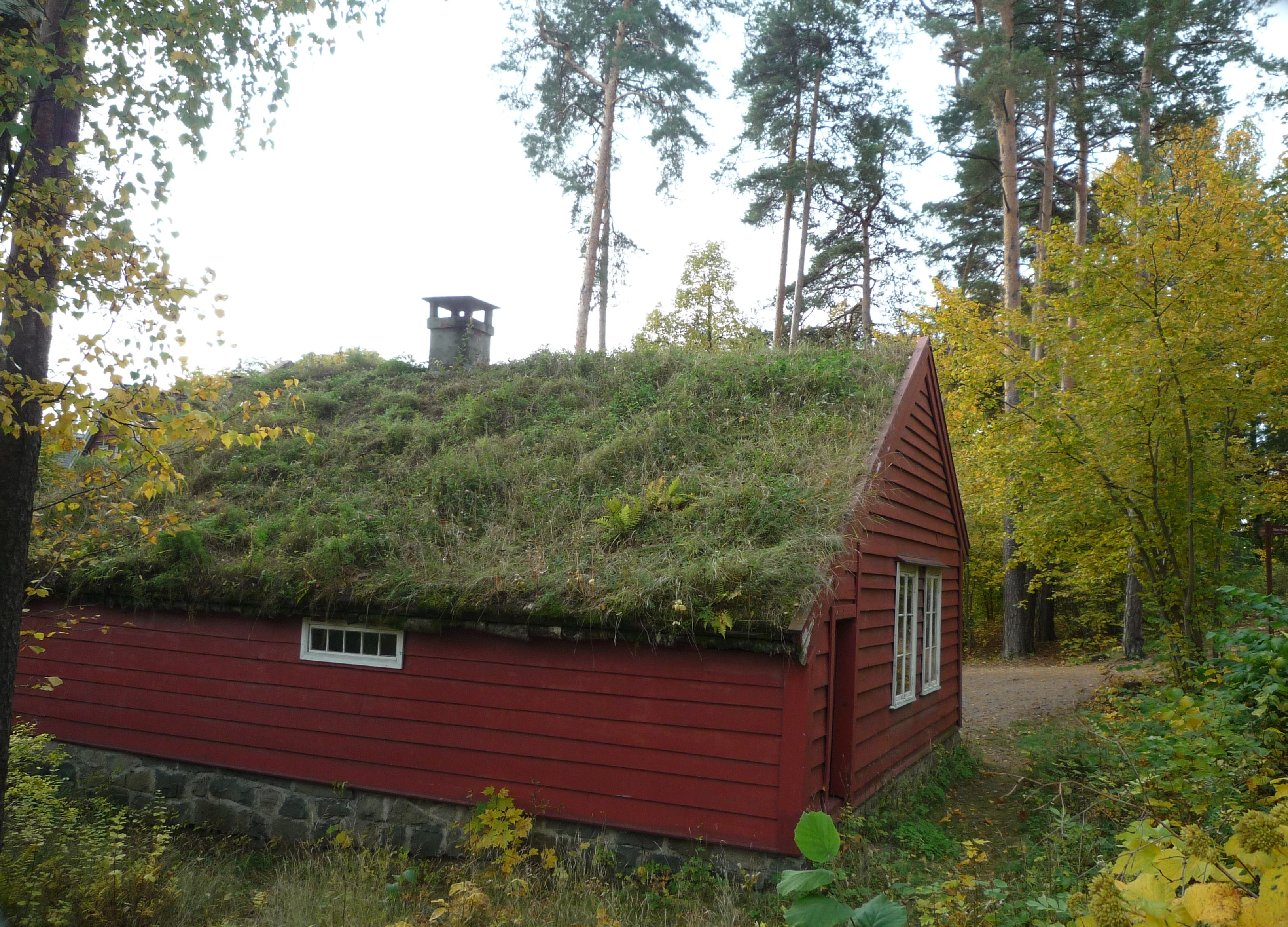 Традиционный норвежский дом